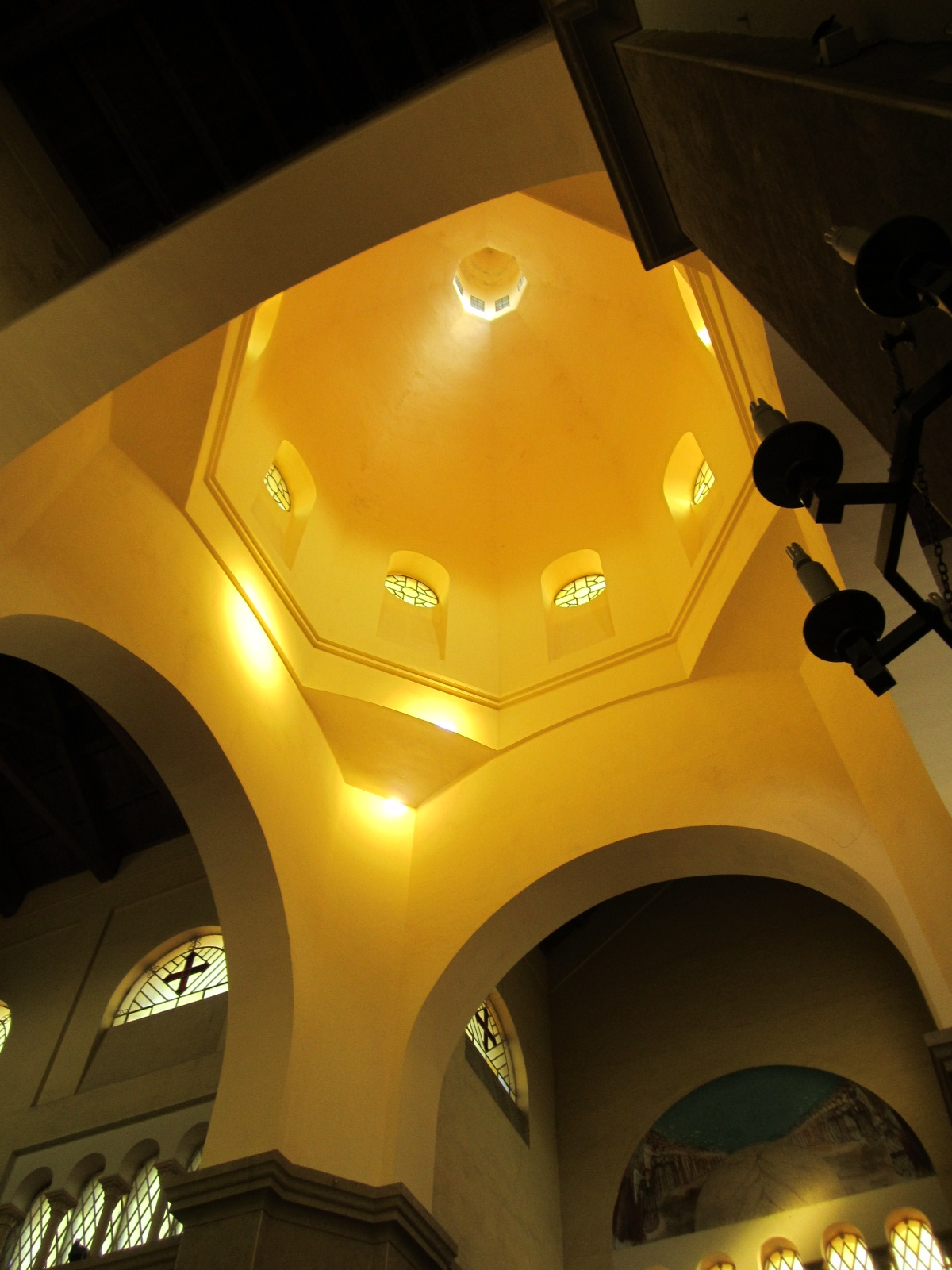 Chiesa